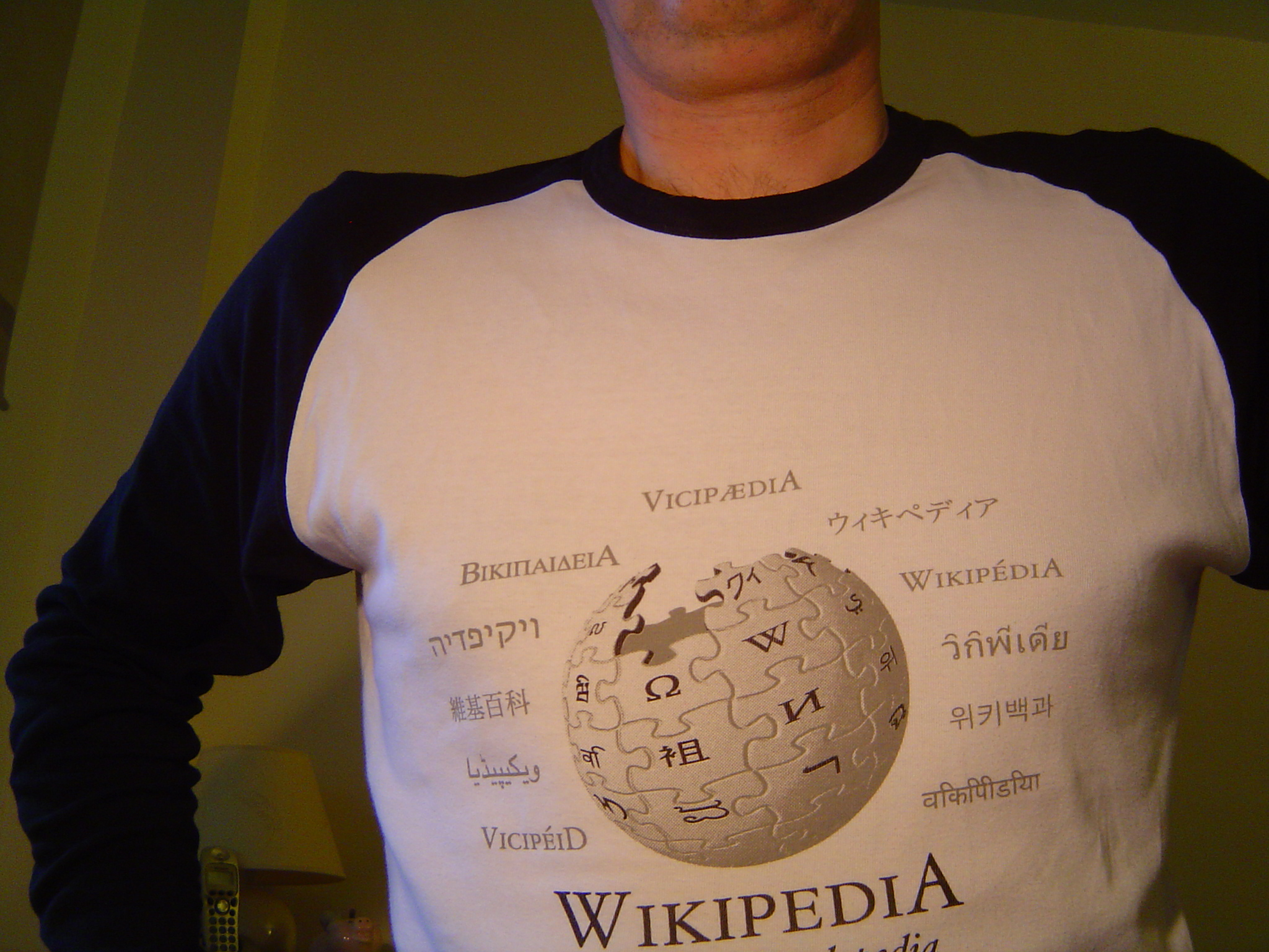 Wikipedia T Shirt